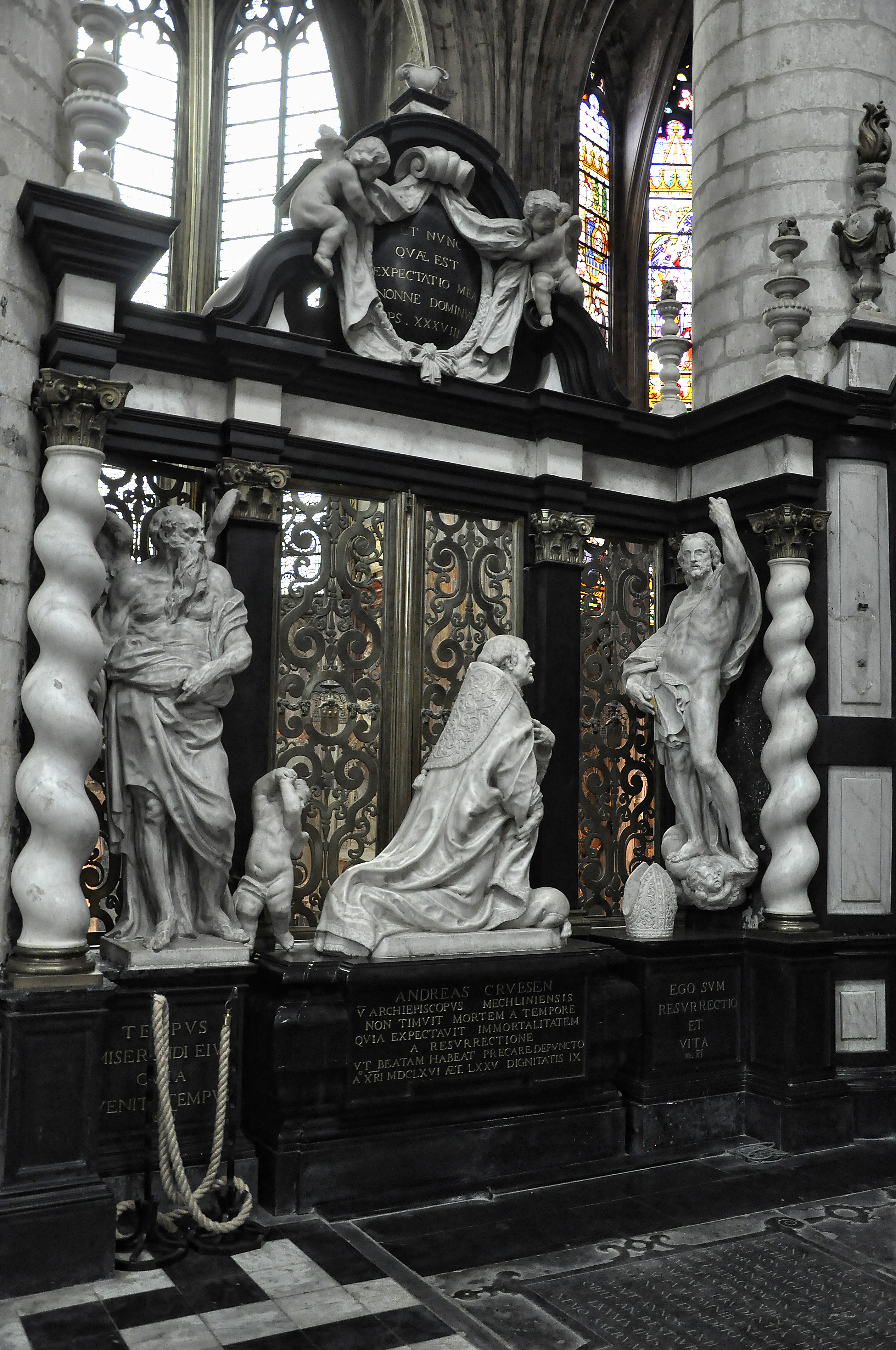 Het grafmonument van aartsbisschop Andreas Cruesen Sint-Romboutskathedraal te Mechelen, België